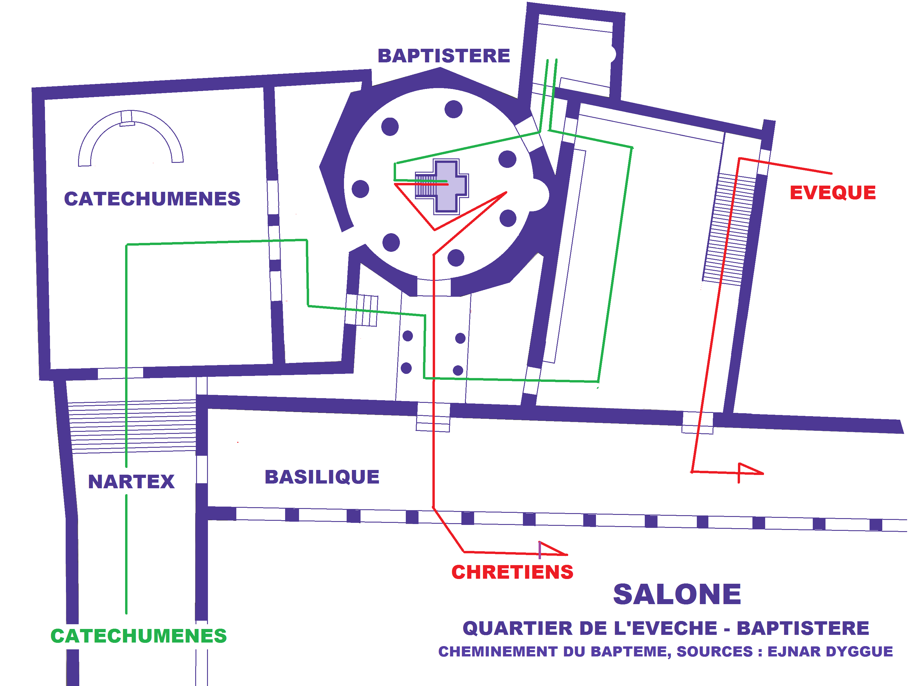 Salone, quartier de l'évêché, plan du baptistère avec cheminement du baptême